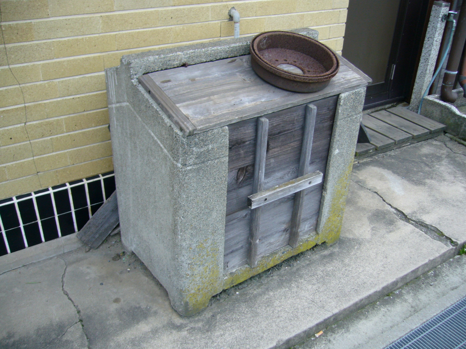 old-japanese-garbage-can,katori-city,japan